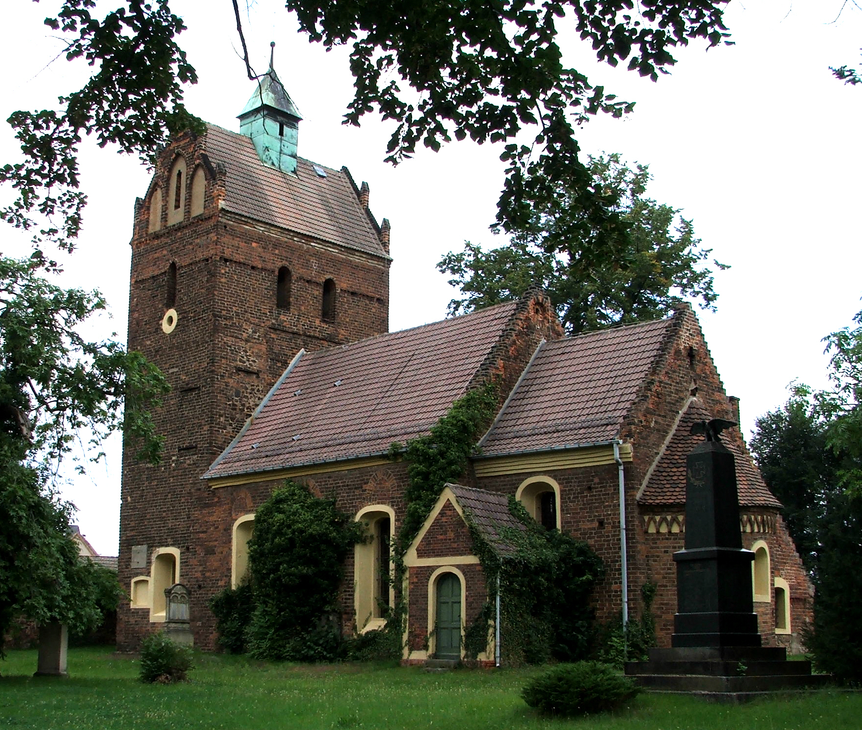 Kirche in Schönborn, Deutschland.